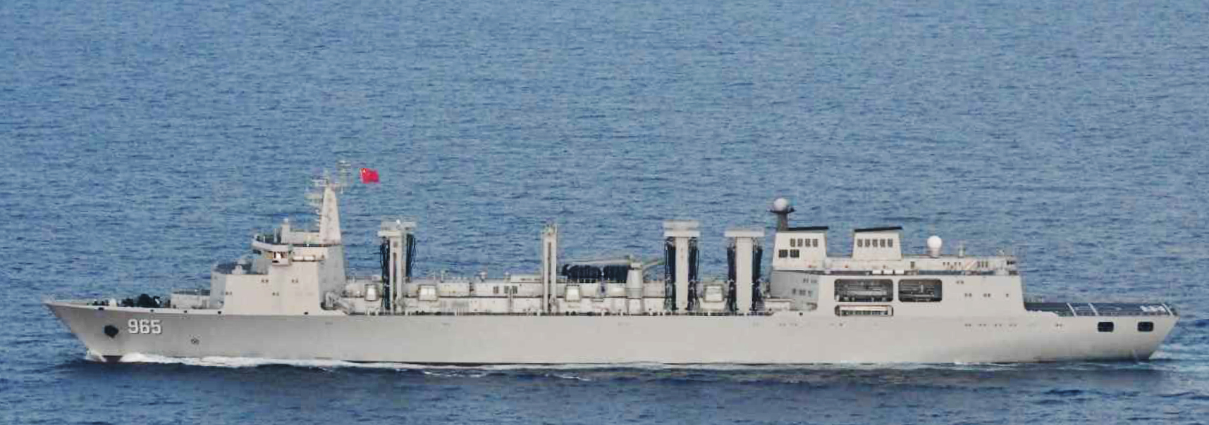 ７月２５日（木）午前５時頃、海上自衛隊第５航空群所属「Ｐ－３Ｃ」（那覇） 及び佐世保地方隊所属「あまくさ」（佐世保）が、宮古島の北約２４０ｋｍの海 域を南下する中国海軍ルーヤンⅢ級ミサイル駆逐艦１隻、ジャンカイⅡ級フリ ゲート２隻及びフユ級高速戦闘支援艦１隻の計４隻を確認した。 その後、これらの艦艇が沖縄本島と宮古島の間の海域を南下し、太平洋へ向け て航行したことを確認した。